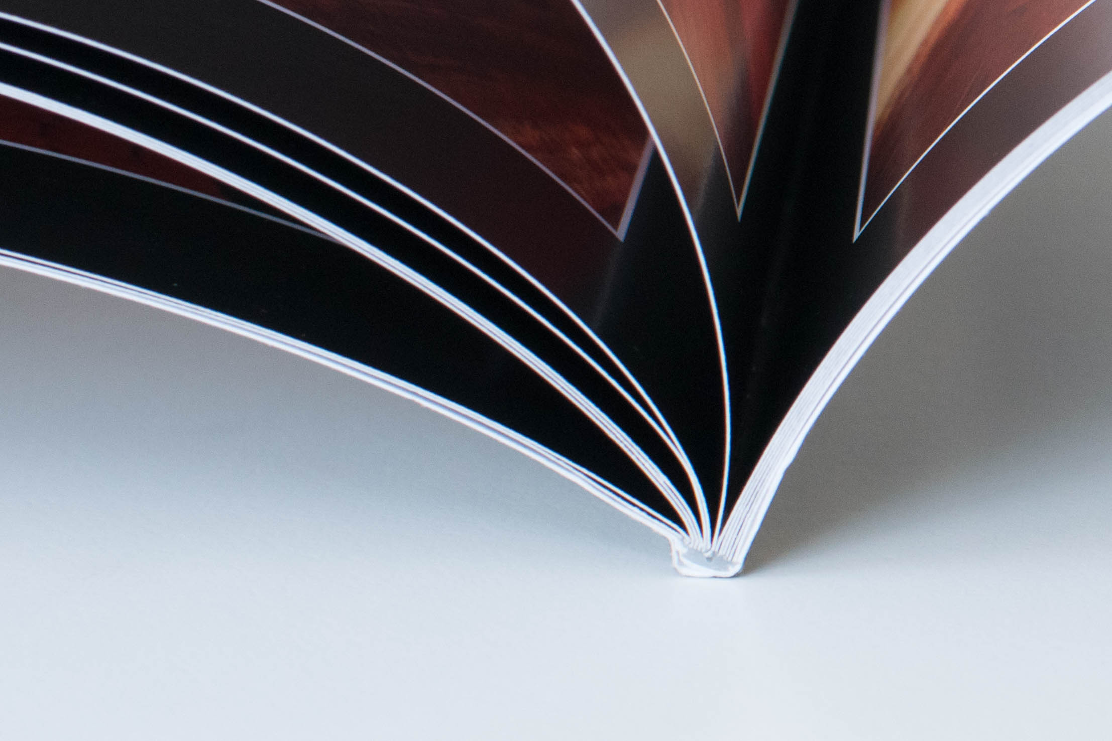 Fotobuch im Digitaldruckverfahren mit Softcover und Klebebindung (Polyurethan)